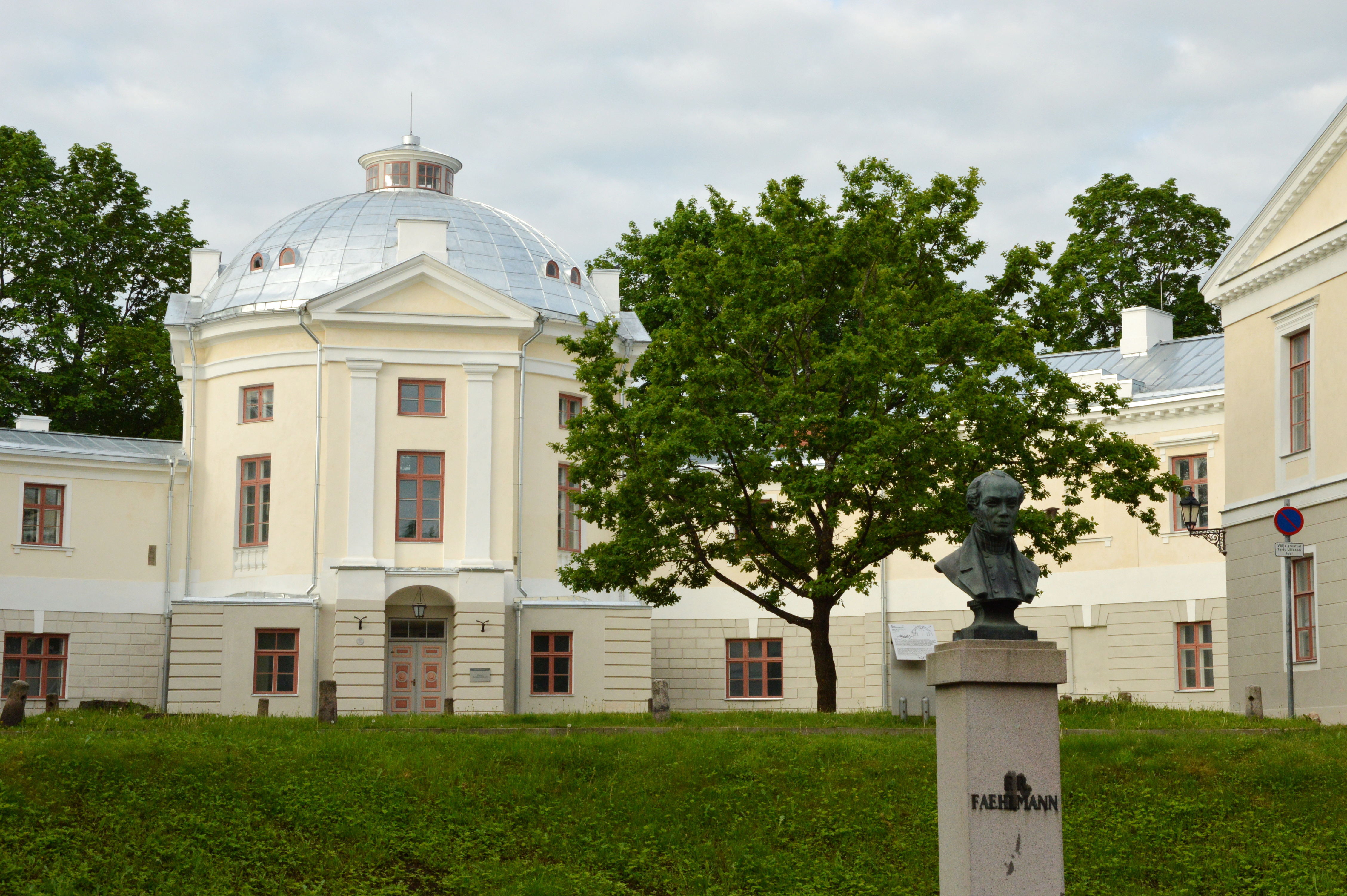 Vana anatoomikum Toomemäel.